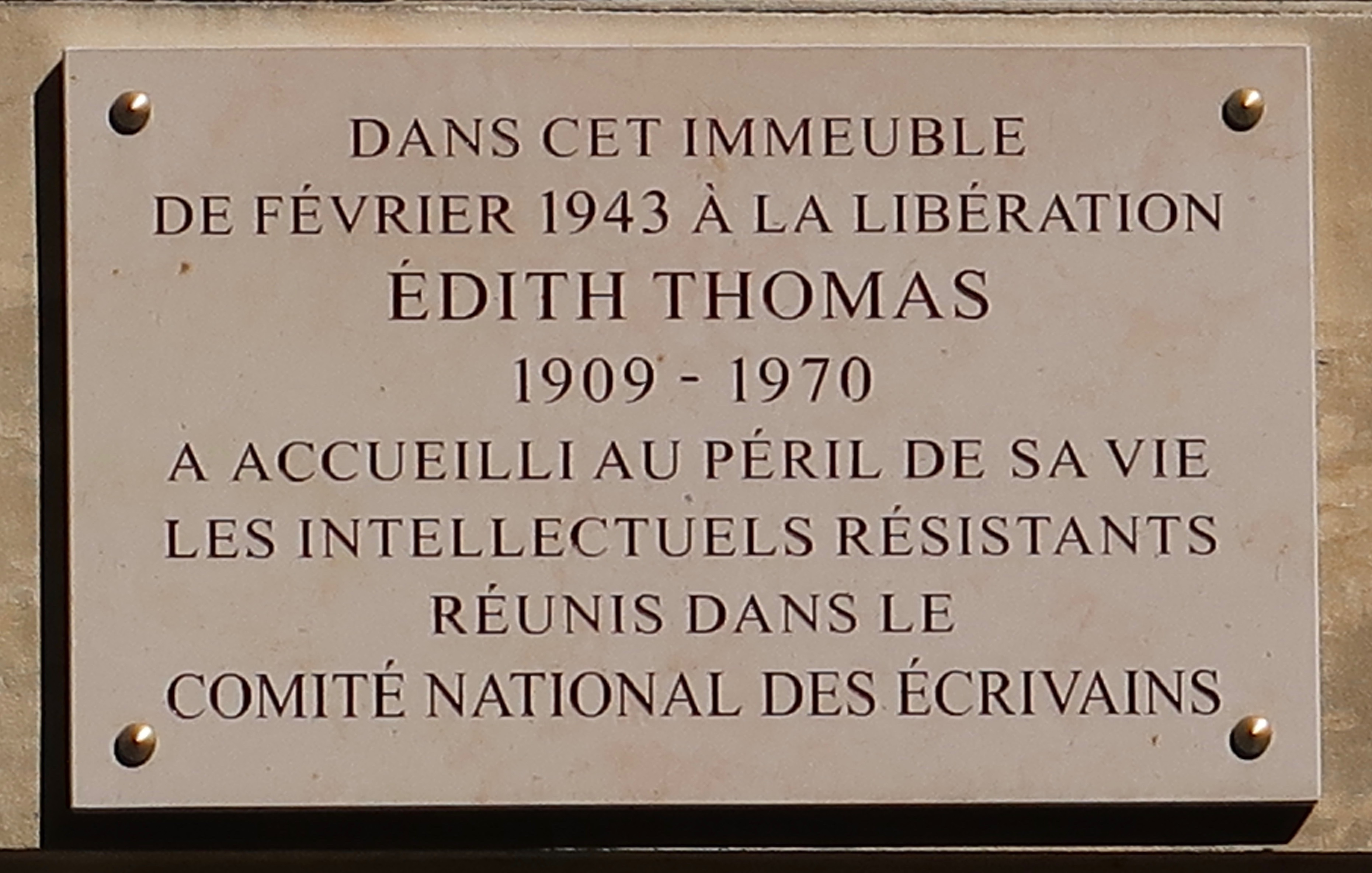 Plaque en hommage à Édith Thomas, 15 rue Pierre-Nicole (Paris, 5e).